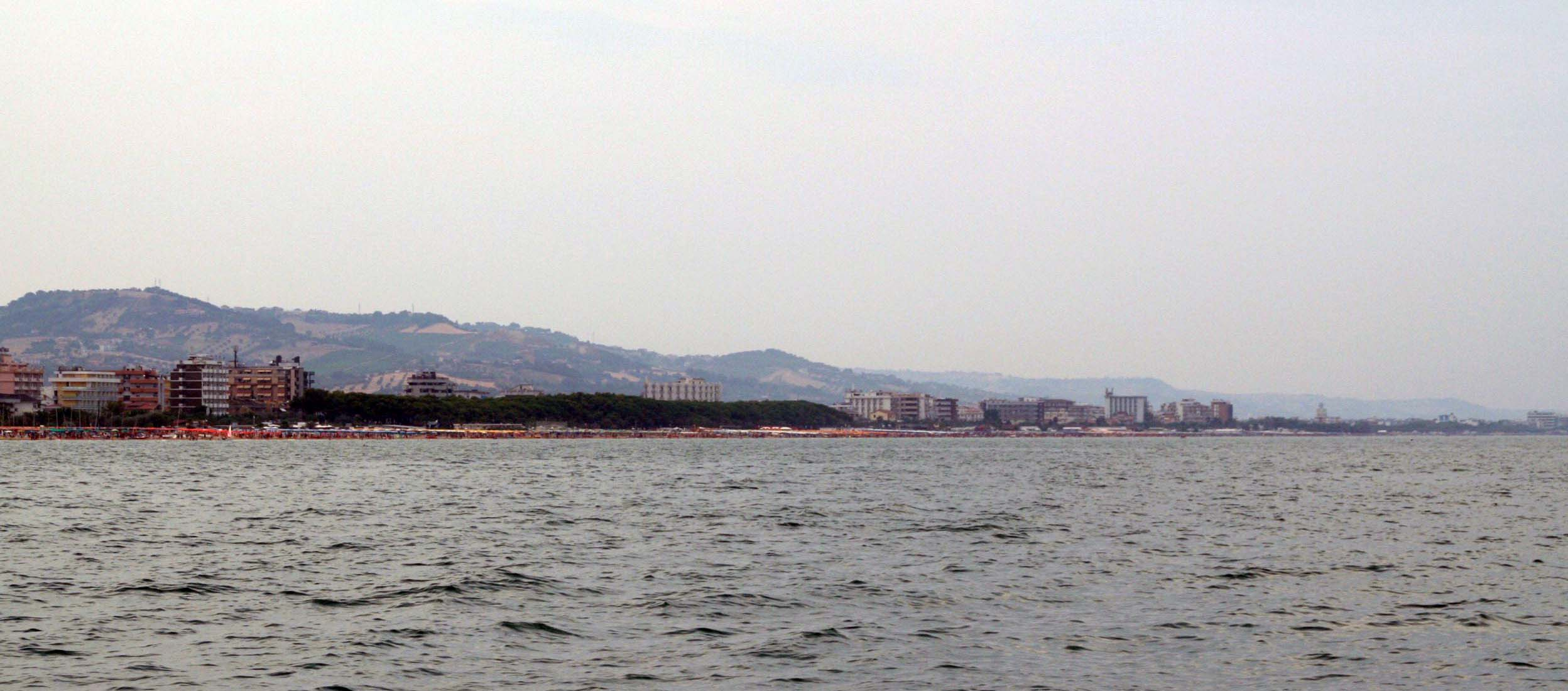 Alba Adriatica vista dal mare